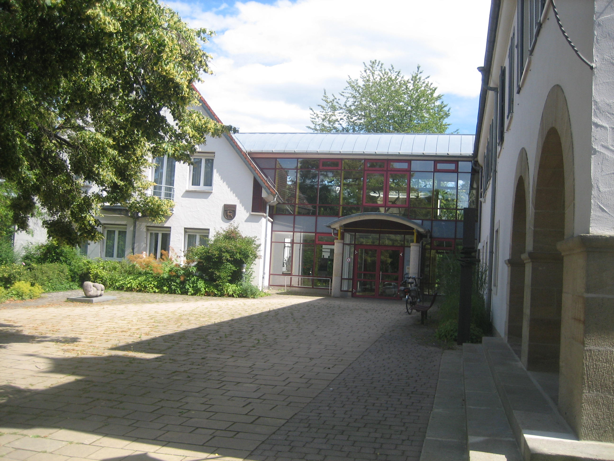 Townhall Dettenhausen